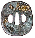 Motiv: japanische Eisen-Tsuba mit Bronze-Einlegearbeiten (Mitte 18. Jahrhundert) Lizenzfreie Fotografie eines Ausstellungsstücks